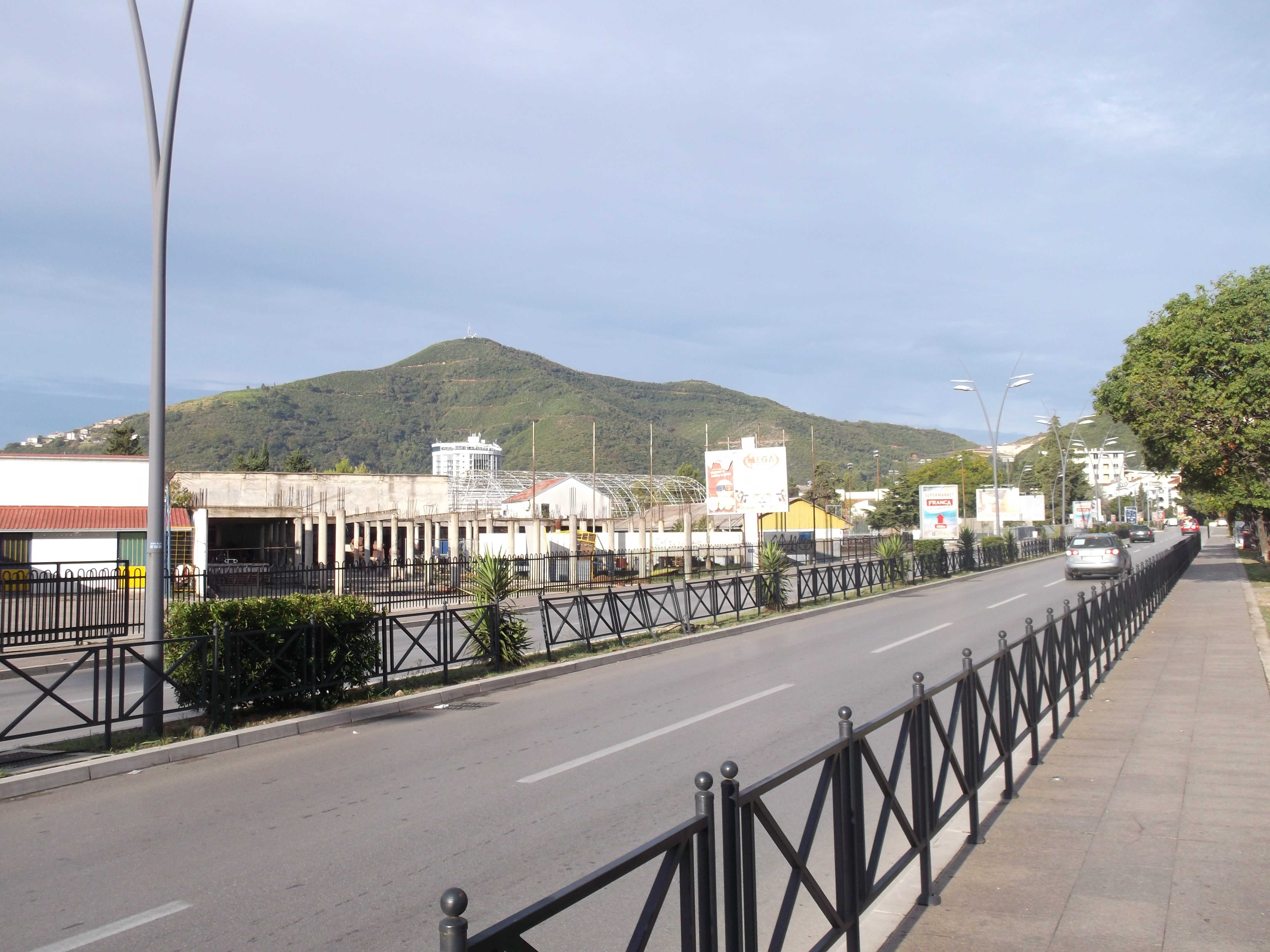 Velji Vinogradi, Budva, Montenegro